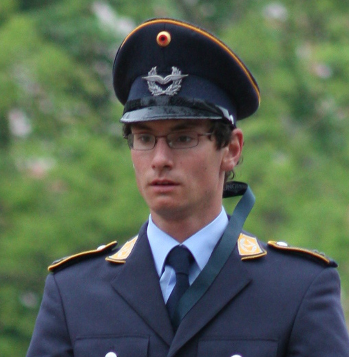 77. Internationanles Wiesbadener Pfingstunier 2013, CIC *** Vielseitigkeitsprüfung Dressur, Benjamin Winter auf Revenue Personality rights warningAlthough this work is freely licensed or in the public domain, the person(s) shown may have rights that legally restrict certain re-uses unless those depicted consent to such uses. In these cases, a model release or other evidence of consent could protect you from infringement claims.